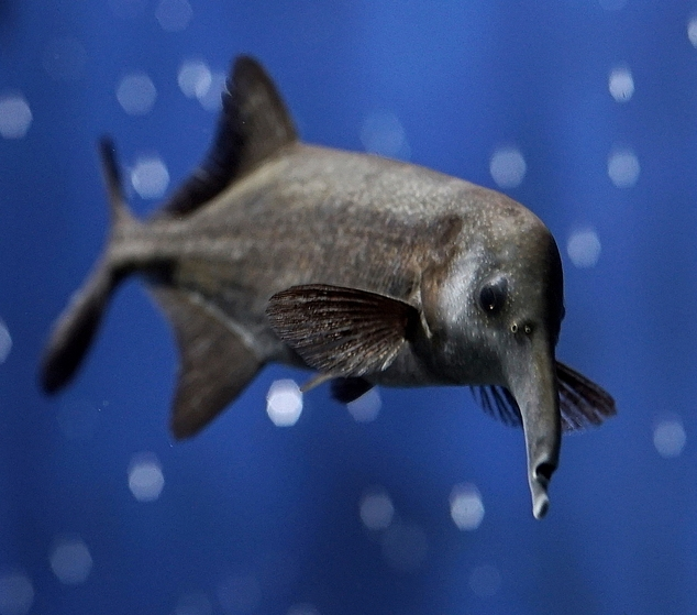 Gnathonemus petersii, en el Sunshine Acuario, Japón